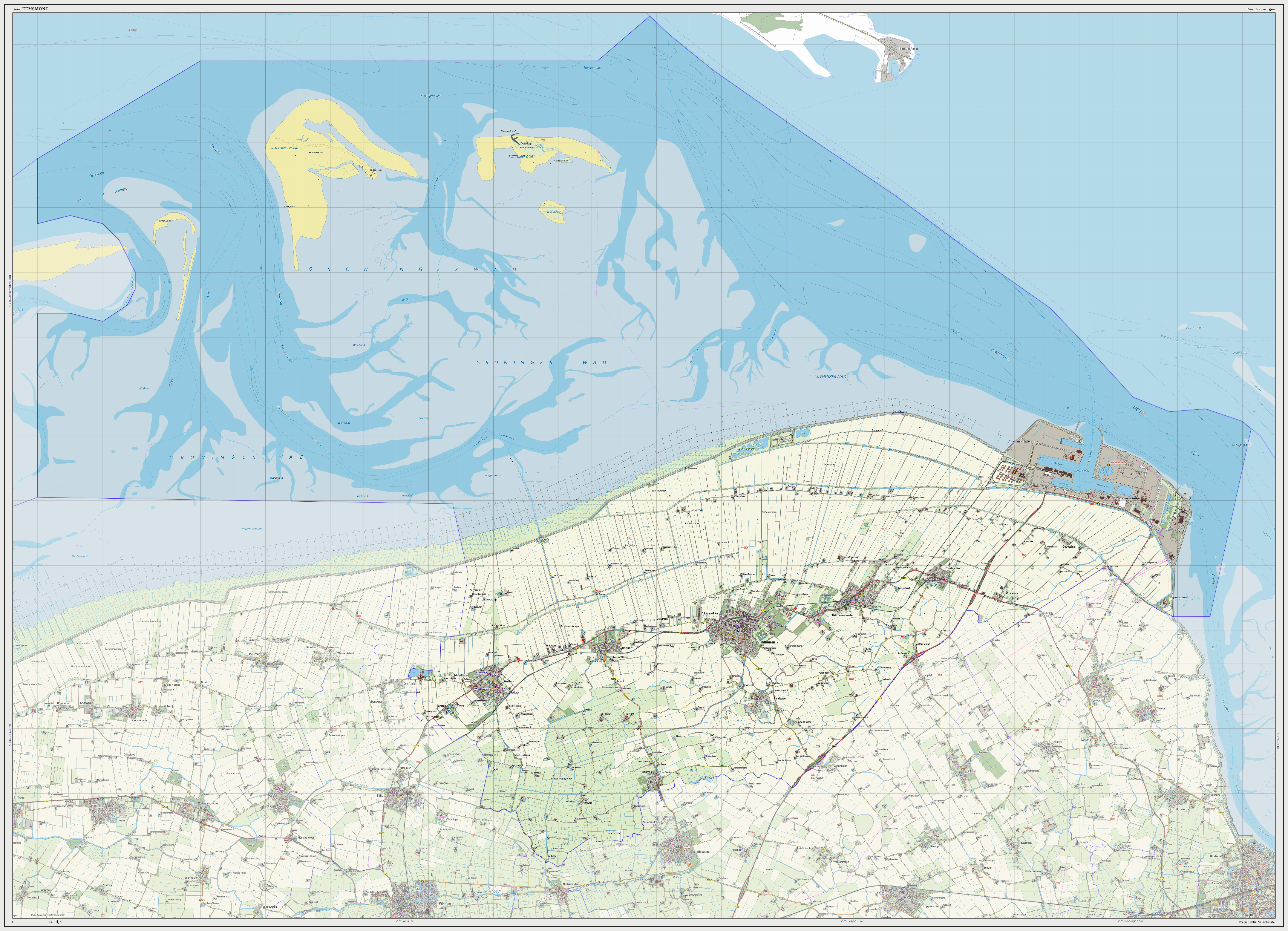 Topografische kaart van gemeente Eemsmond (2013). Samengesteld door Jan-Willem van Aalst op basis van de GML open geodata van de BRT/Top10NL (basisregistratie Topografie, Kadaster 2011), vrijgegeven door Kadaster onder de Creative Commons BY licentie. Additionele gegevens uit BAG (8 juli 2013), uit de Open Street Map (9 juli 2013) en uit de Risicokaart. Peildatum kaartbeeld: 9 juli 2013. Zie ook Gemeentenatlas.nl Samenstelling en kleurenschema: Jan-Willem van Aalst, met QuantumGIS en Photoshop. Zie ook de Legenda.